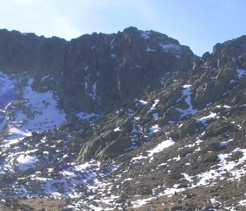 Cara norte del Risco de los Pájaros (Sierra de Guadarrama, España).